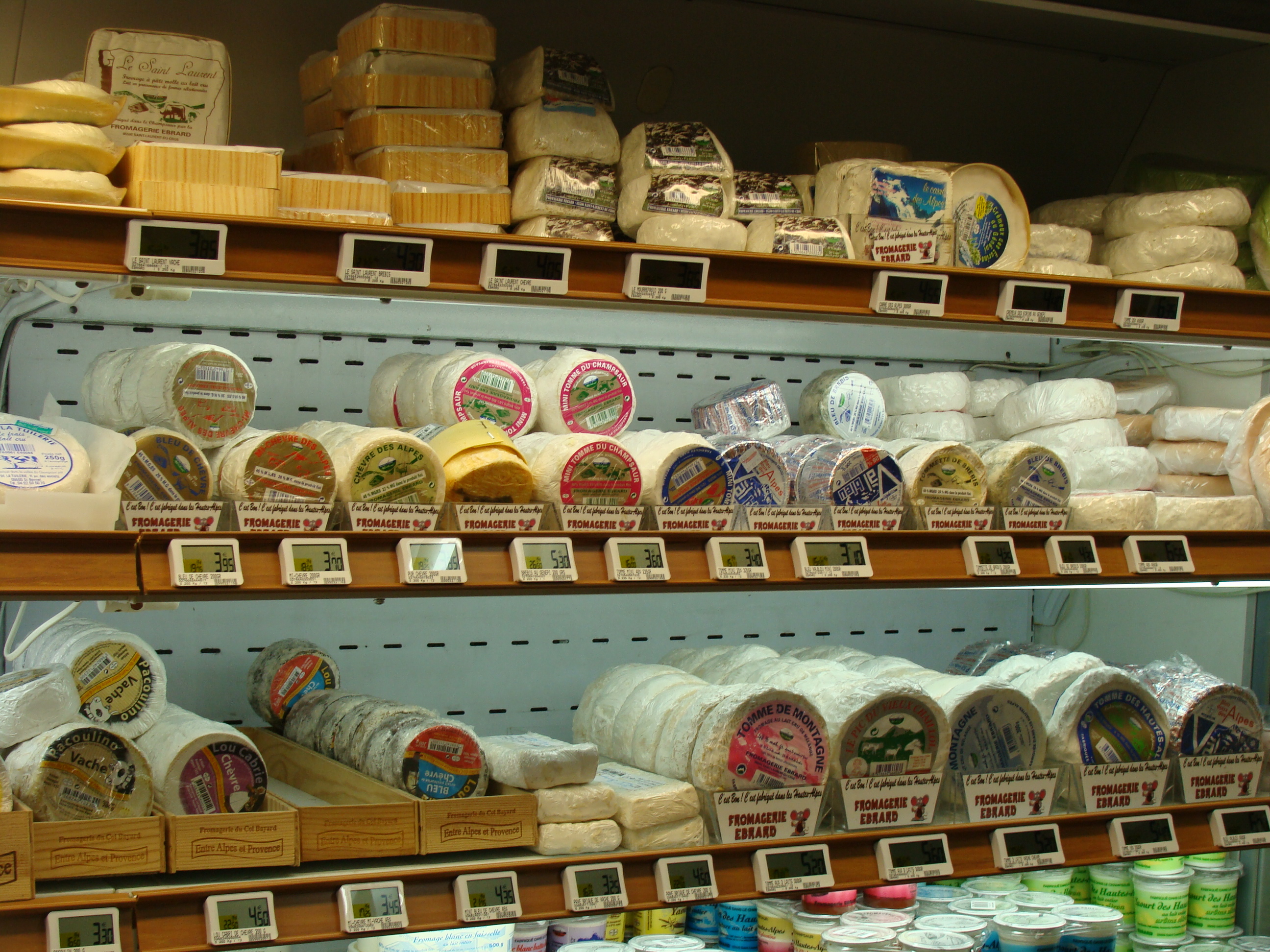 Etal de fromages du Champsaur dans une grande surface locale.